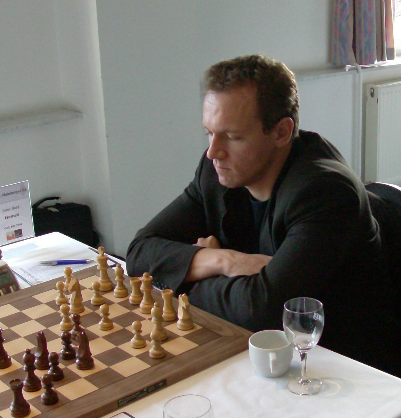 Sune Berg Hansen, chess grandmaster